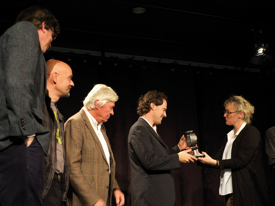 Verleihung Albert-Mangelsdorff Preis an Nils Wogram durch Vorstandsvorsitzende der UDJ, Julia Hülsmann (rechts; links von Wogram Manfred Schoof)